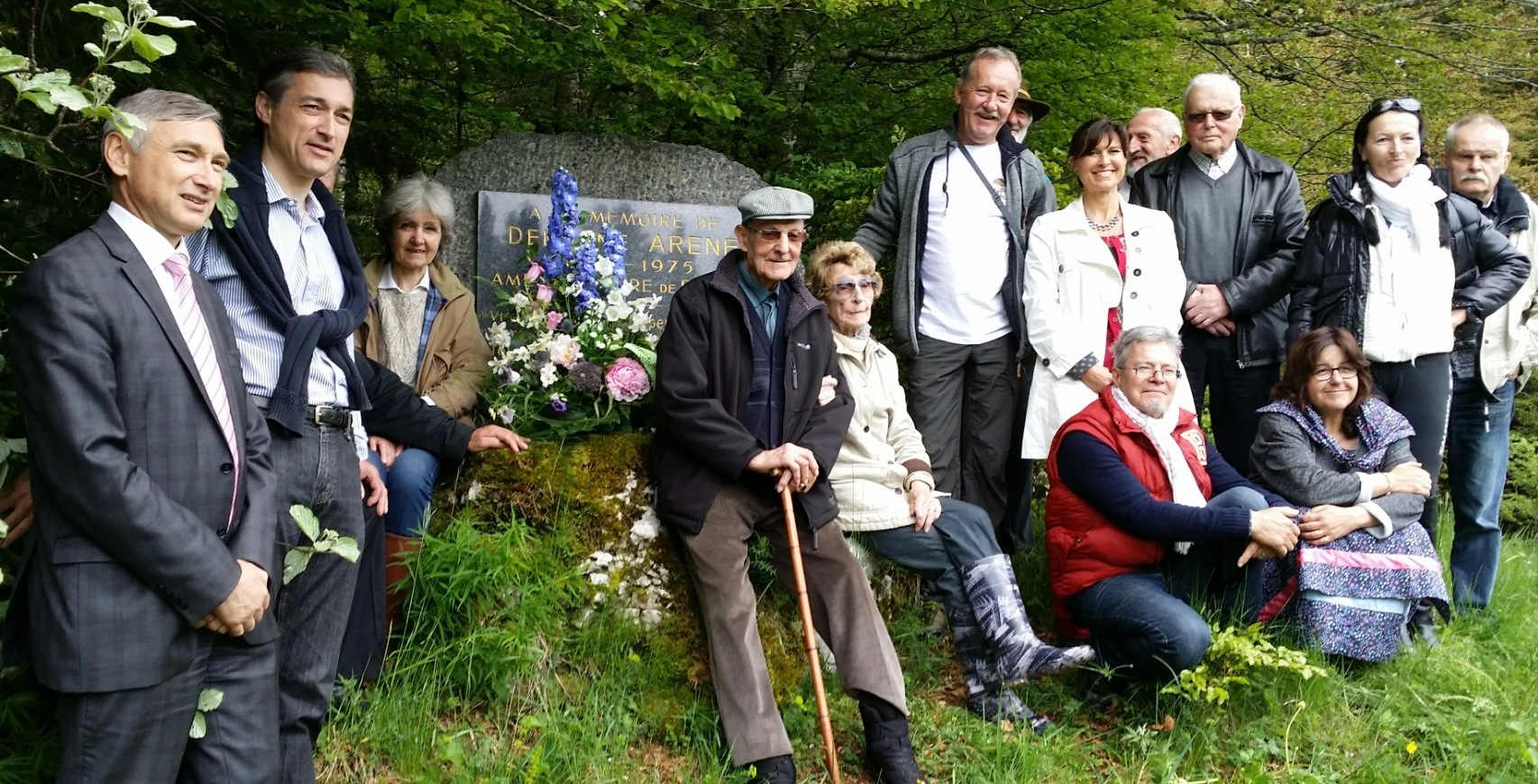 Dépôt de Gerbe par les Amis de Retord à l'occasion des 130 ans de la naissance de Delphine Arène